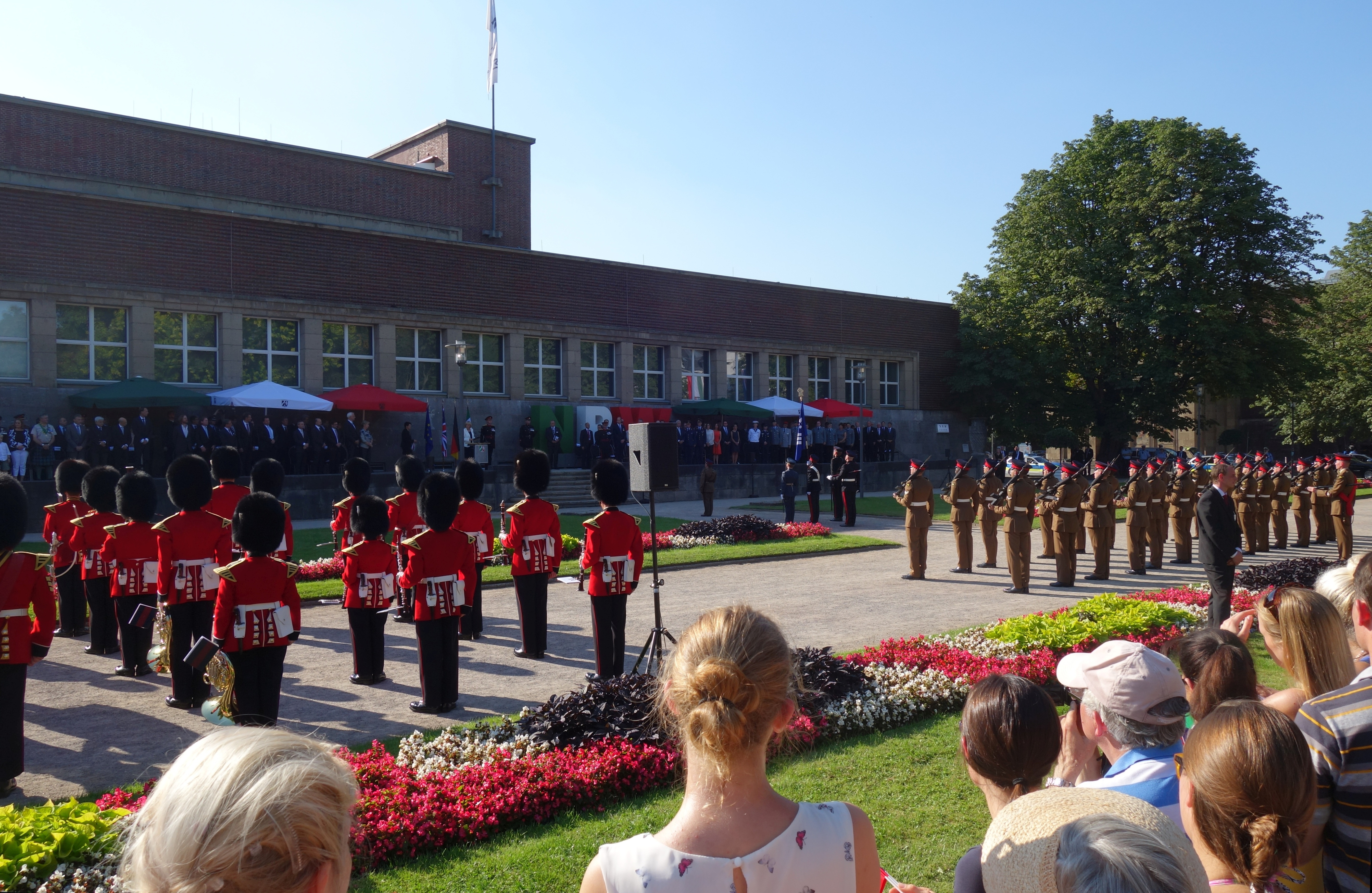 Düsseldorf Ehrenhof, NRW-Tag zum 70-jährigen Bestehen Nordrhein-Westfalens. Fahnenbandverleihung an die 20. Panzerbrigade der Britischen Streitkräfte in Deutschland, unter anderem unter der Anwesenheit von Prinz William und Hannelore Kraft, Ministerpräsidentin von Nordrhein-Westfalen.